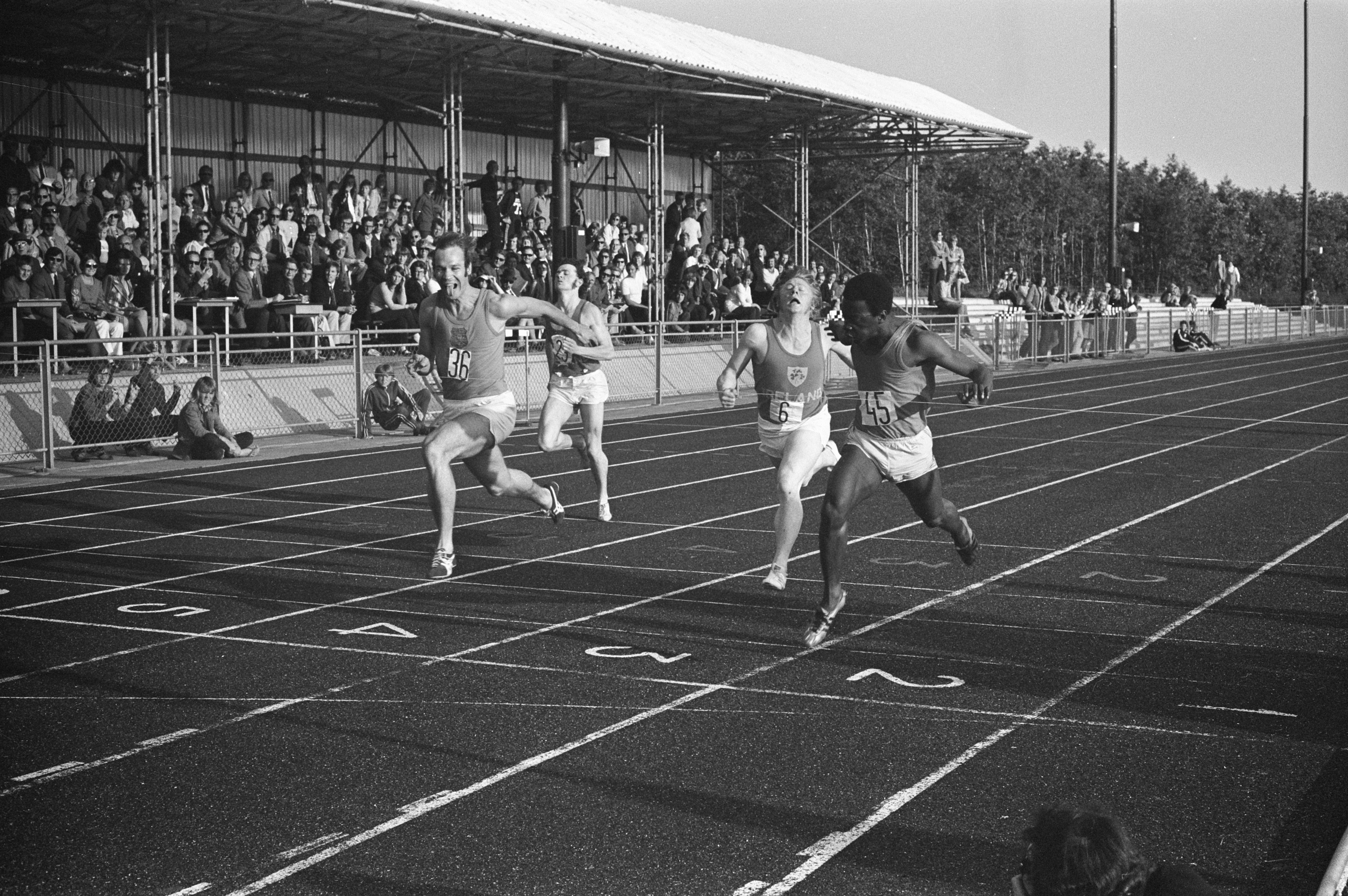 Collectie / Archief : Fotocollectie Anefo Reportage / Serie : [ onbekend ] Beschrijving : Atletiek-interland Nederland tegen Ierland te Drachten, finish 100 meter Sammy Monsels (rechts) wint, links B. de Jager Datum : 12 juli 1972 Locatie : Drachten Trefwoorden : atletiek Persoonsnaam : B. de Jager Fotograaf : Verhoeff, Bert / Anefo Auteursrechthebbende : Nationaal Archief Materiaalsoort : Negatief (zwart/wit) Nummer archiefinventaris : bekijk toegang 2.24.01.05 Bestanddeelnummer : 925-7339